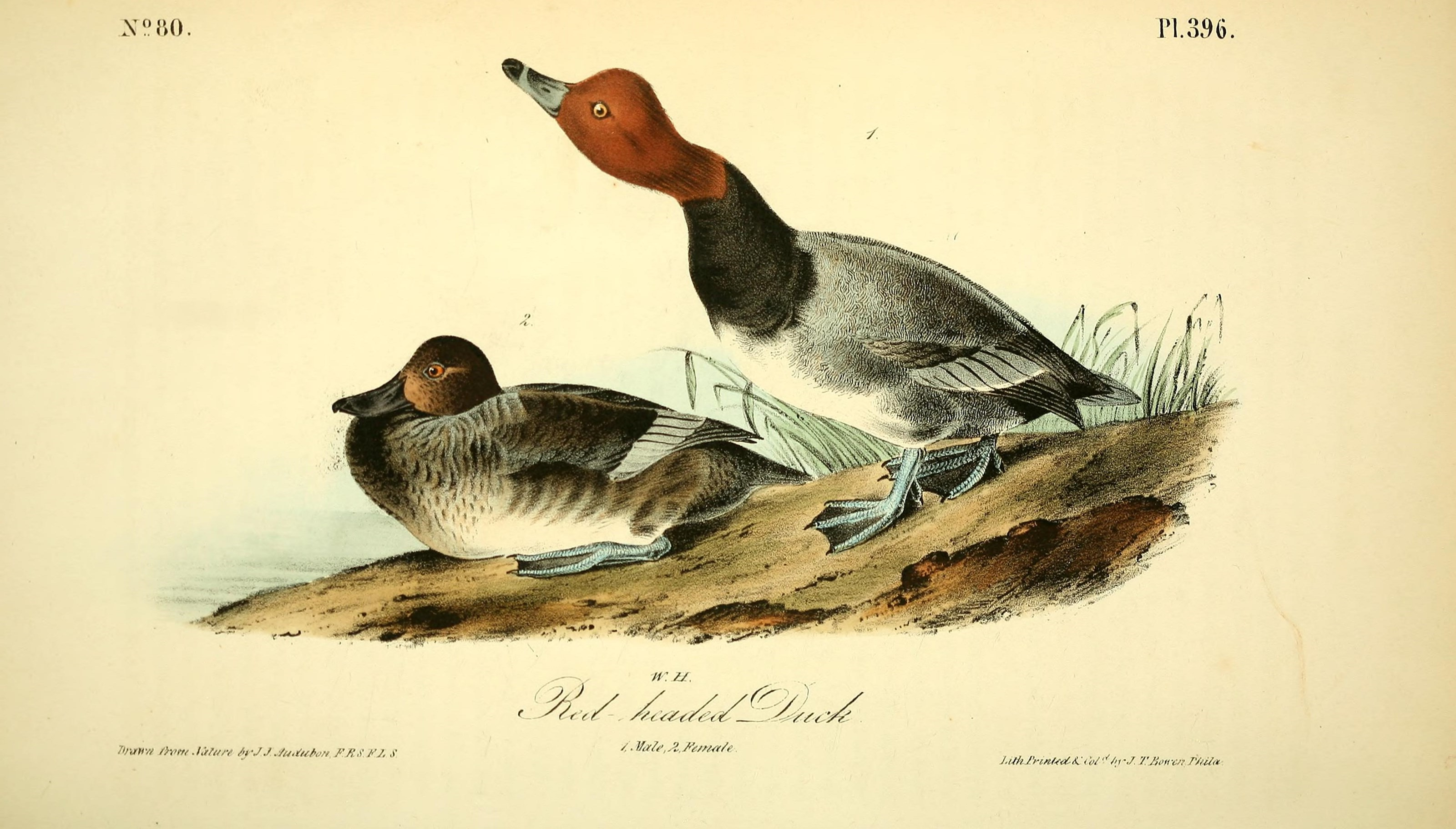 CO o ^ S i w ^ X